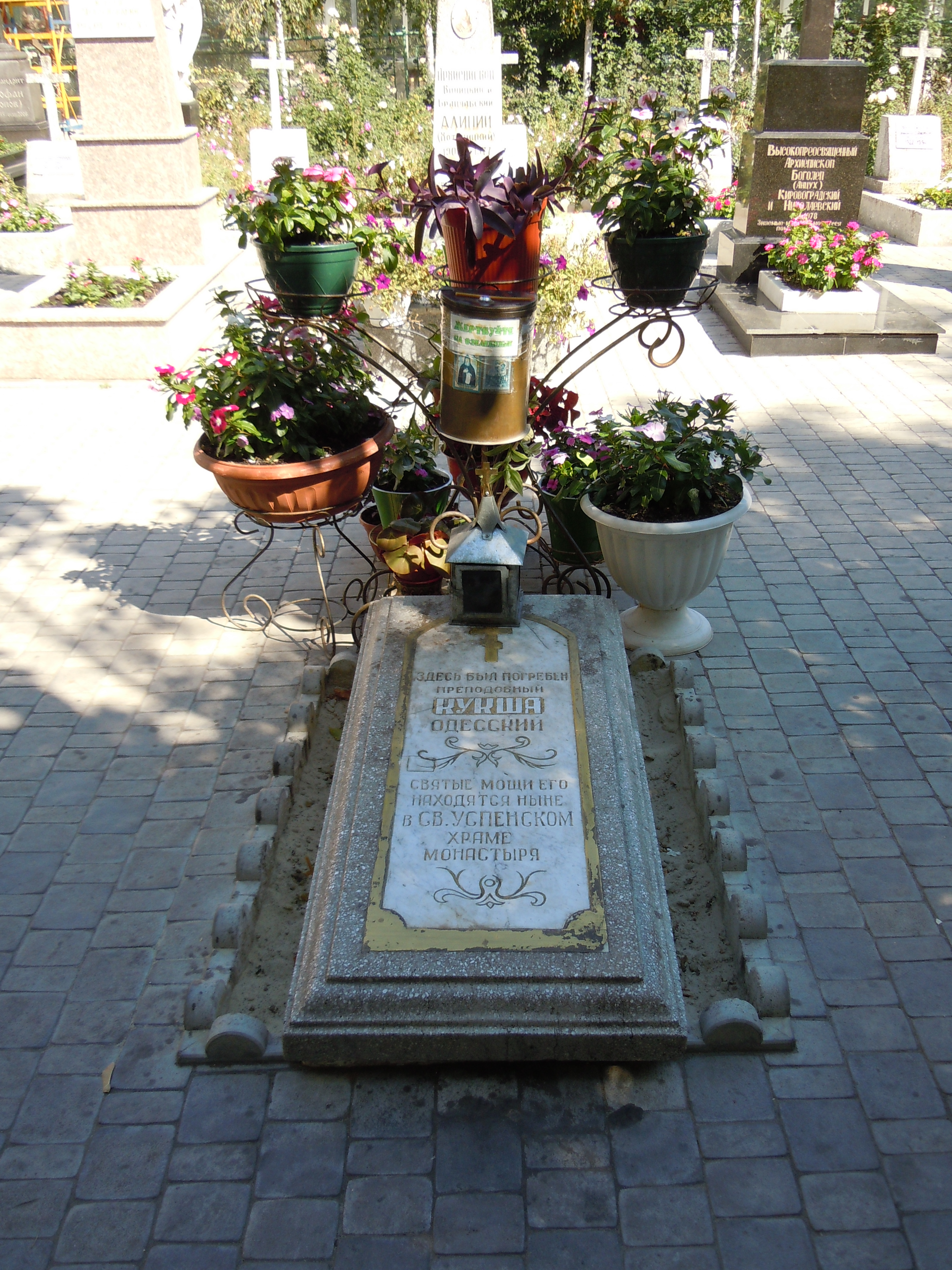 Місце захоронення Святого Кукші Одеського